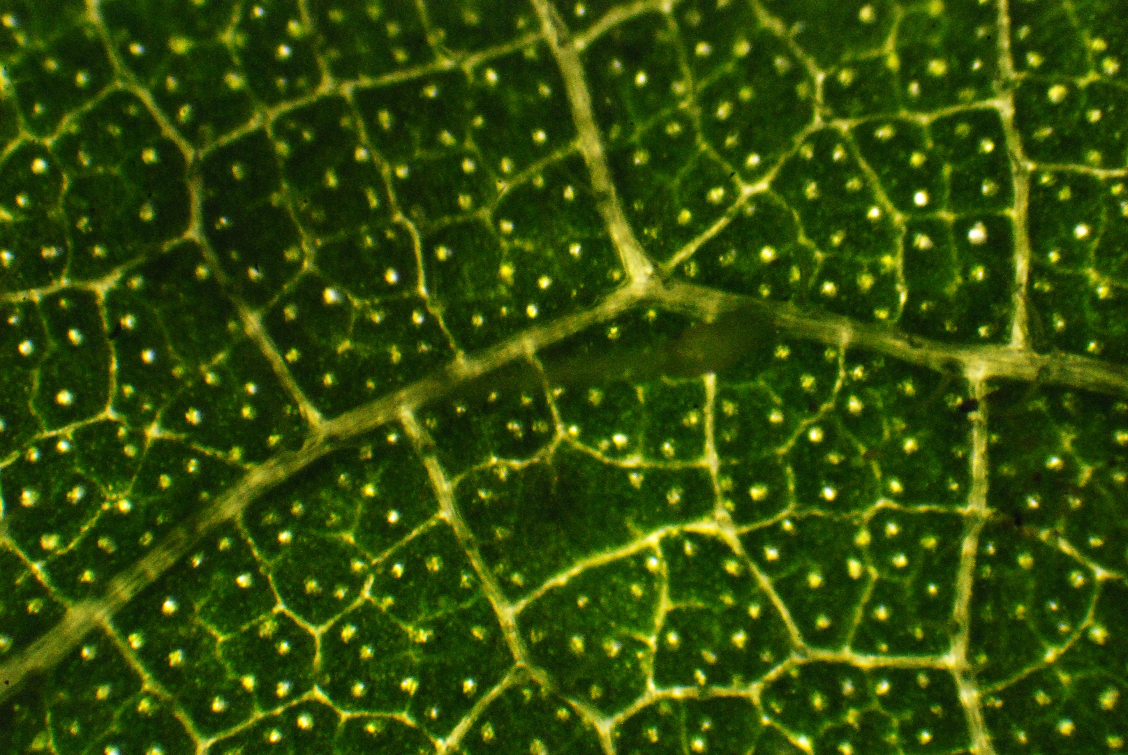 Urtica dioica, cystolithes